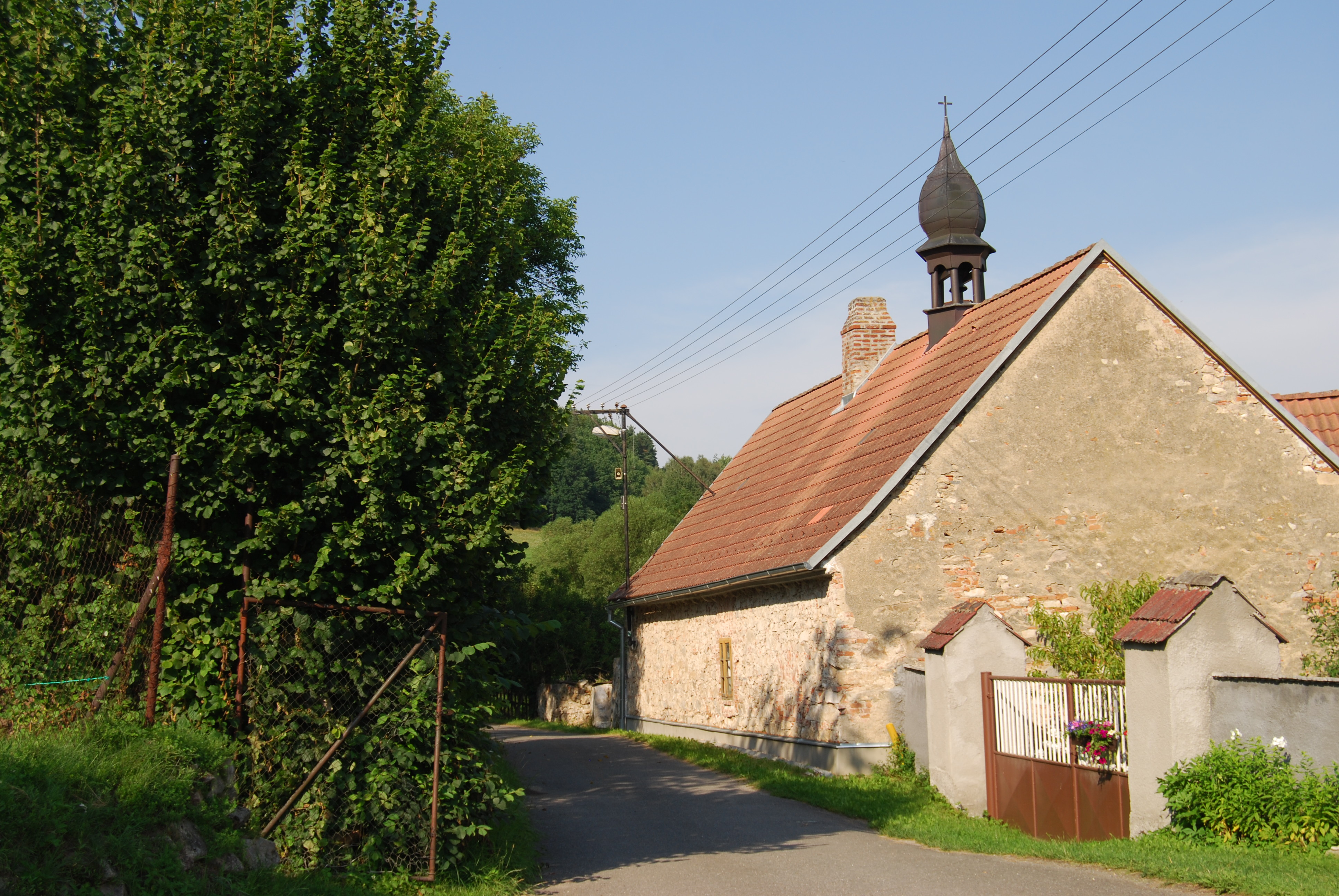 Pohled na část obce. Modlíkov je malá část obce Nadějkov v okrese Tábor. Česká republika.